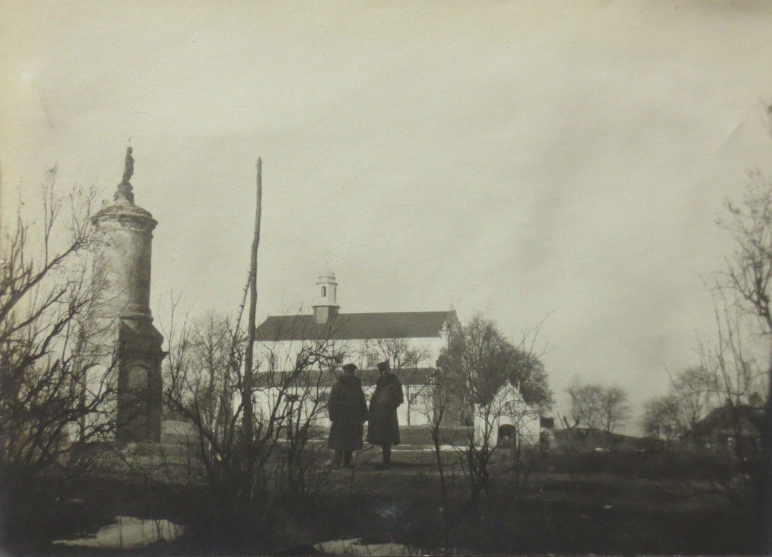 Беларуская (тарашкевіца): Вістычы (Vistyčy). Касьцёл Сьвятой Соф'і і кляштар цыстэрыянаў